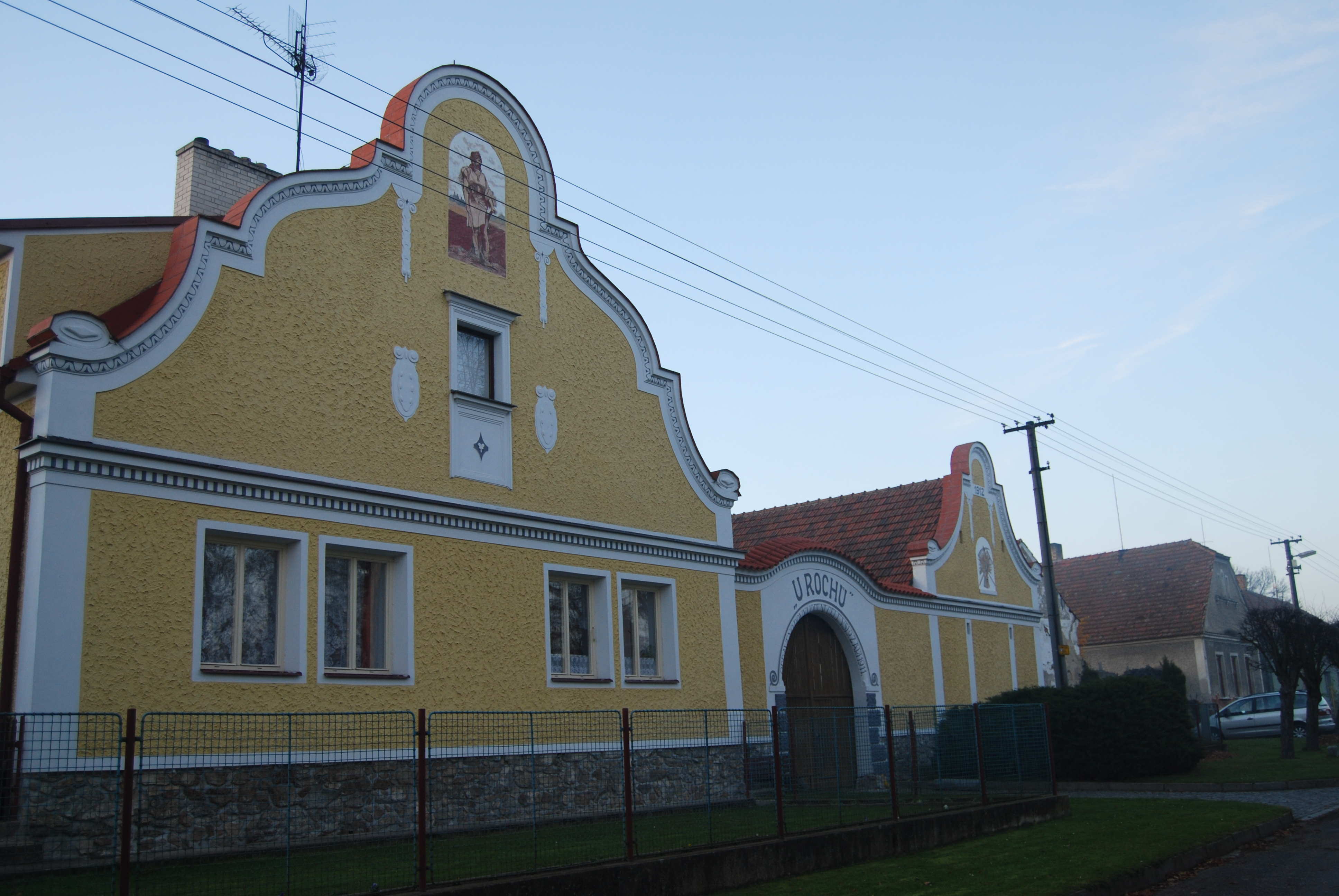 Venkovská usedlost čp. 1. Jamný je část obce Záhoří. Okres Písek. Česká republika.